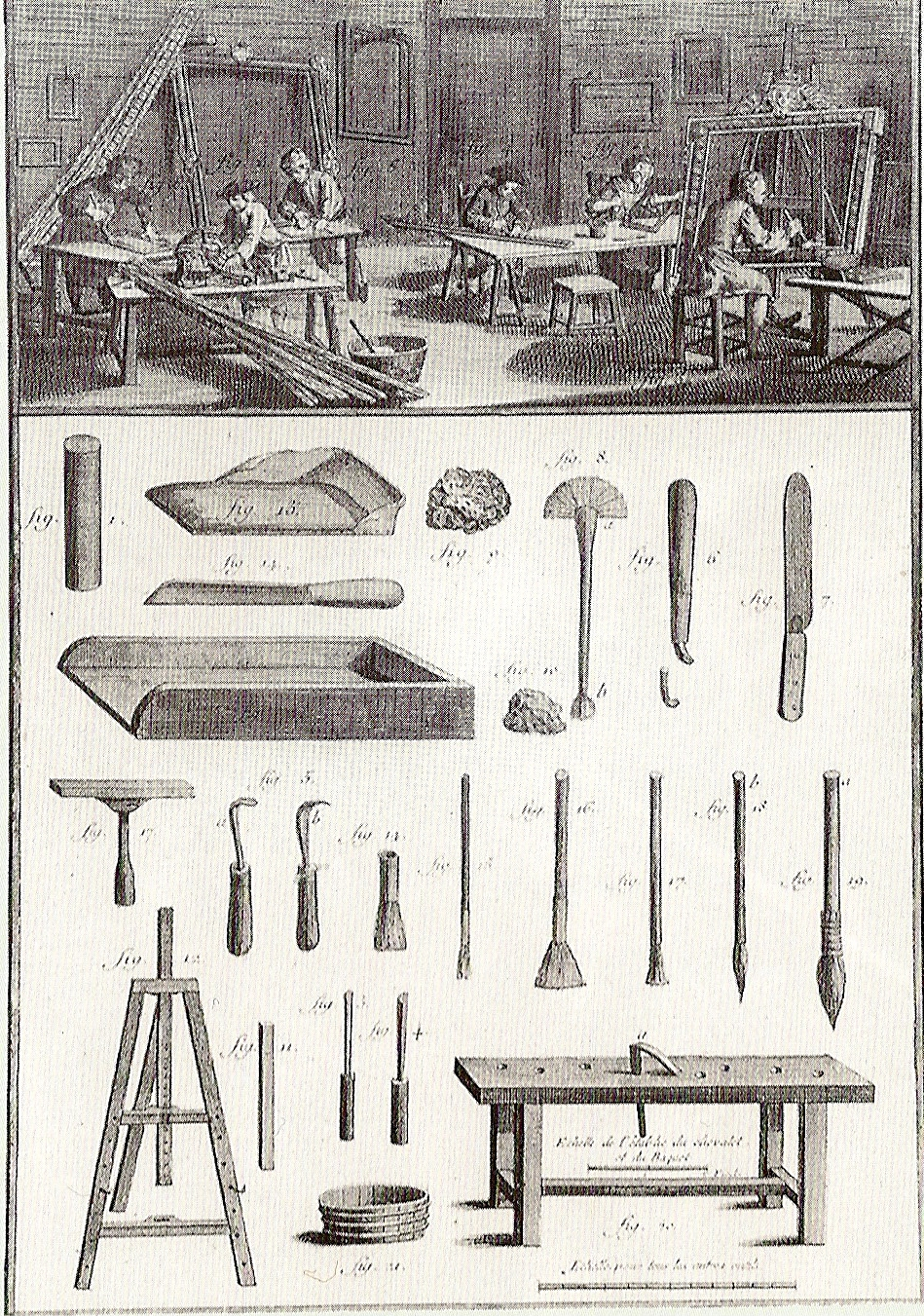 Abb. in der Enzyklopädie von Diderot und d'Alembert (1751-1765) —— oben: Atelier eines Rahmenvergolders, unten: typische Werkzeuge der Rahmenmacher, von denen viele noch heute gebräuchlich sind